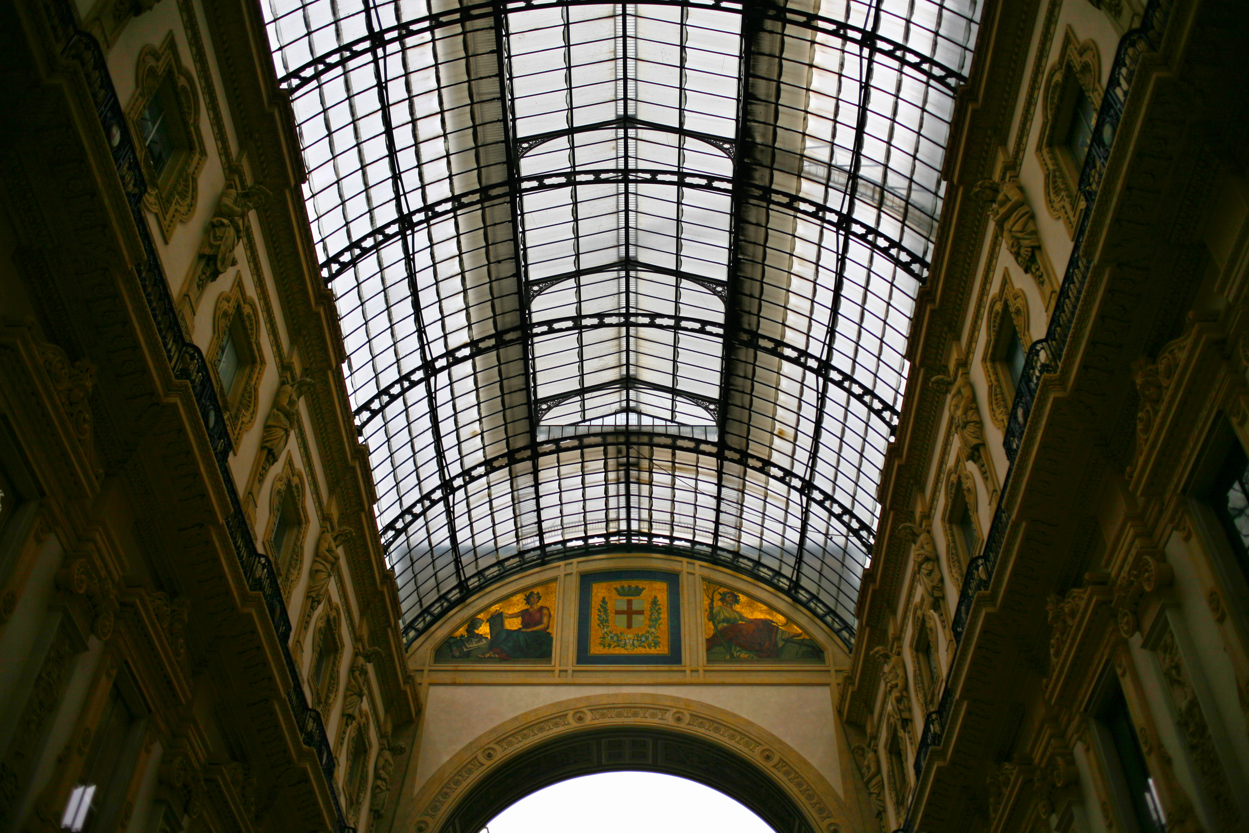 Galleria di Milano,dettagli interno Stemma